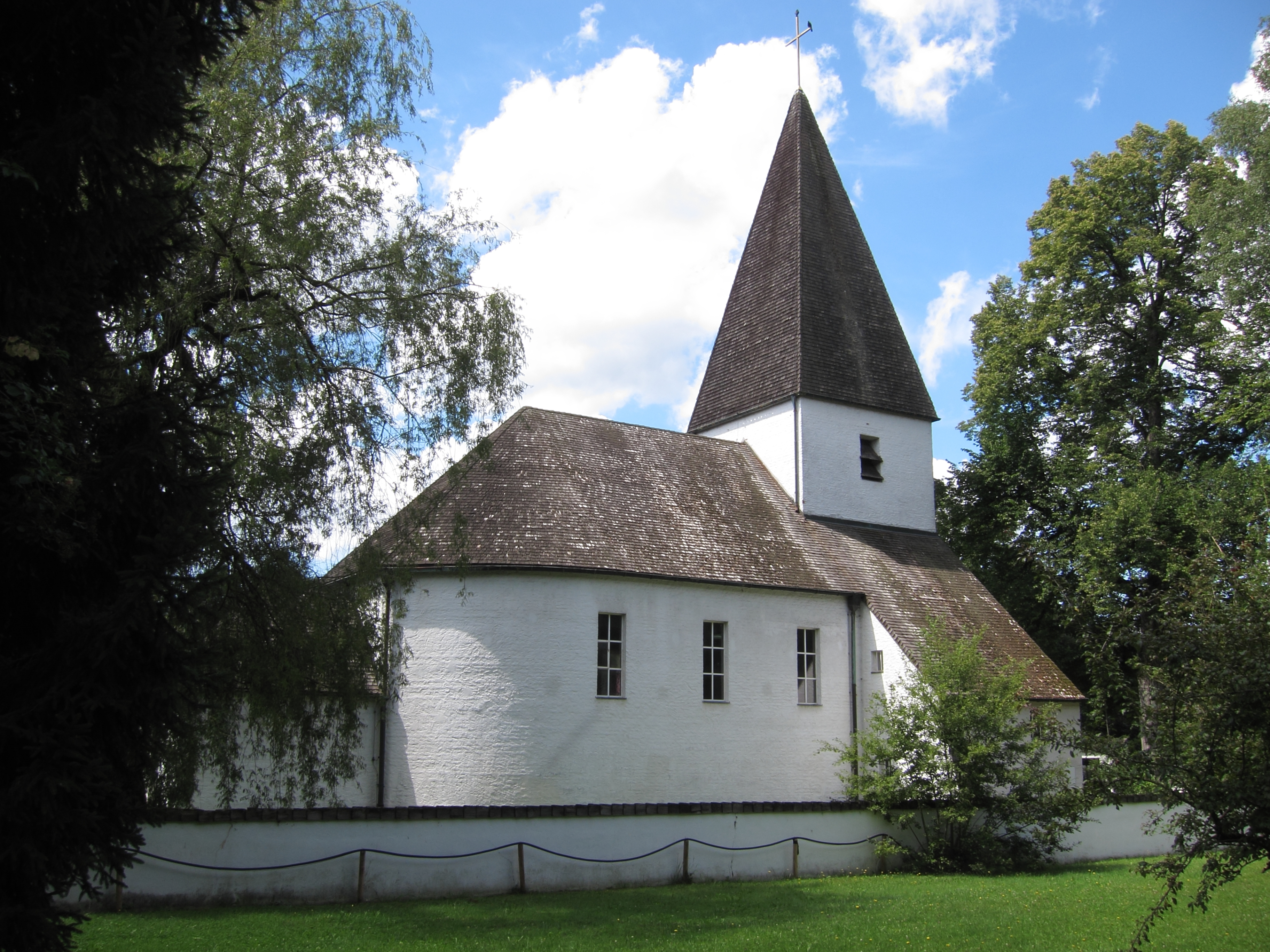 Thomaskirche, Ludwig-Thoma-Platz 5; Evangangelisch-Lutherische Kirche, Backstein geschlämmt, 1931/32 von Delisle und Ingwersen im Stil der Neuen Sachlichkeit erbaut; mit Ausstattung